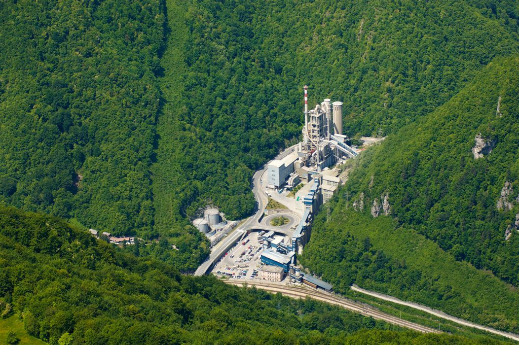 Cementarna iz zraka leta 2010